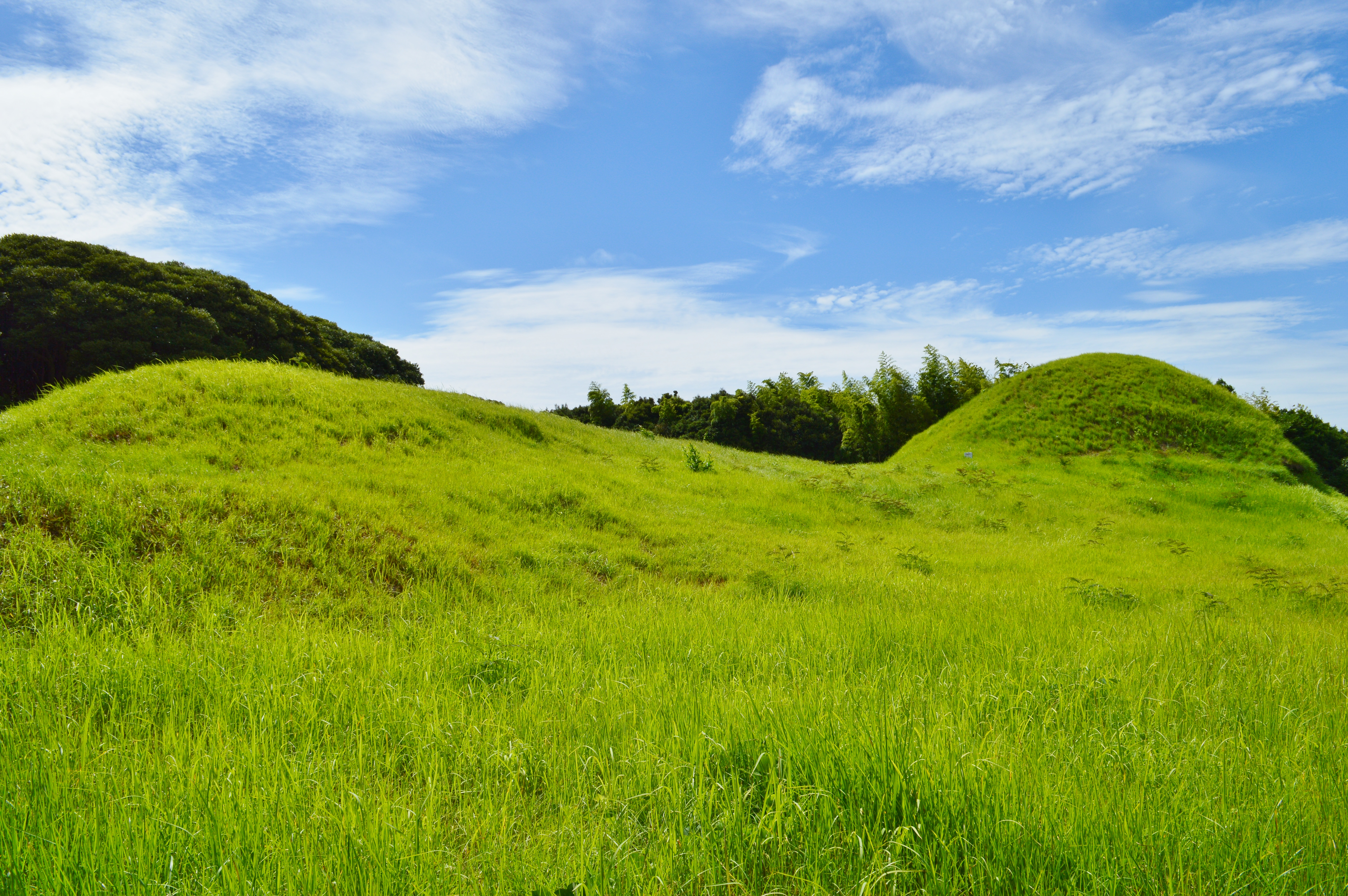 双六古墳 墳丘全景